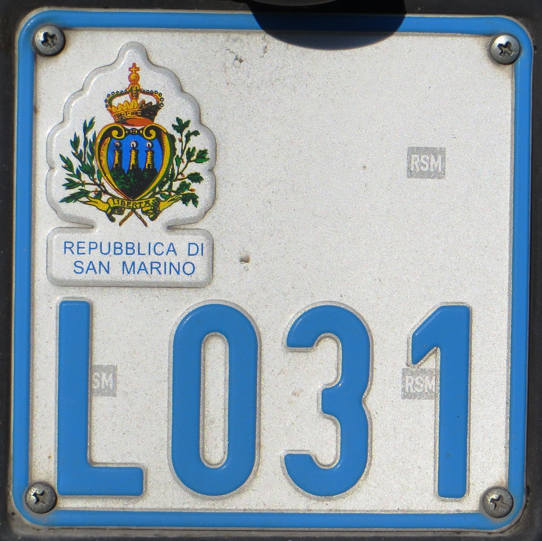 kentekenplaat San Marino